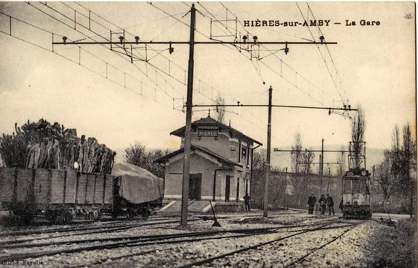 Carte postale ancienne éditée par Fayolle : HIÈRES-SUR-AMBY - La Gare Il s'agit de la gare de la ligne 16 de l'OTL, dont on voit une motrice à droite du cliché